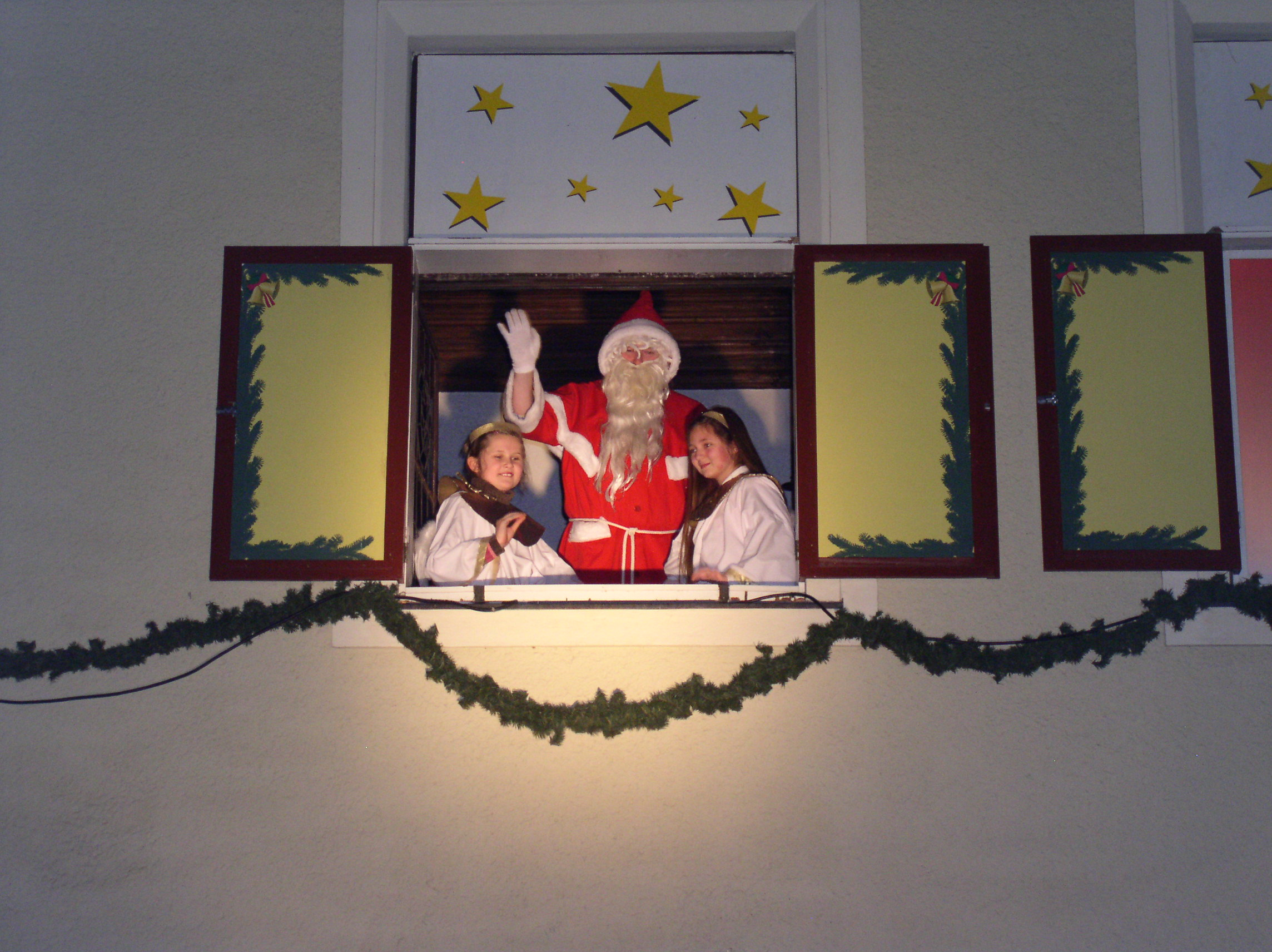 Adventskalender